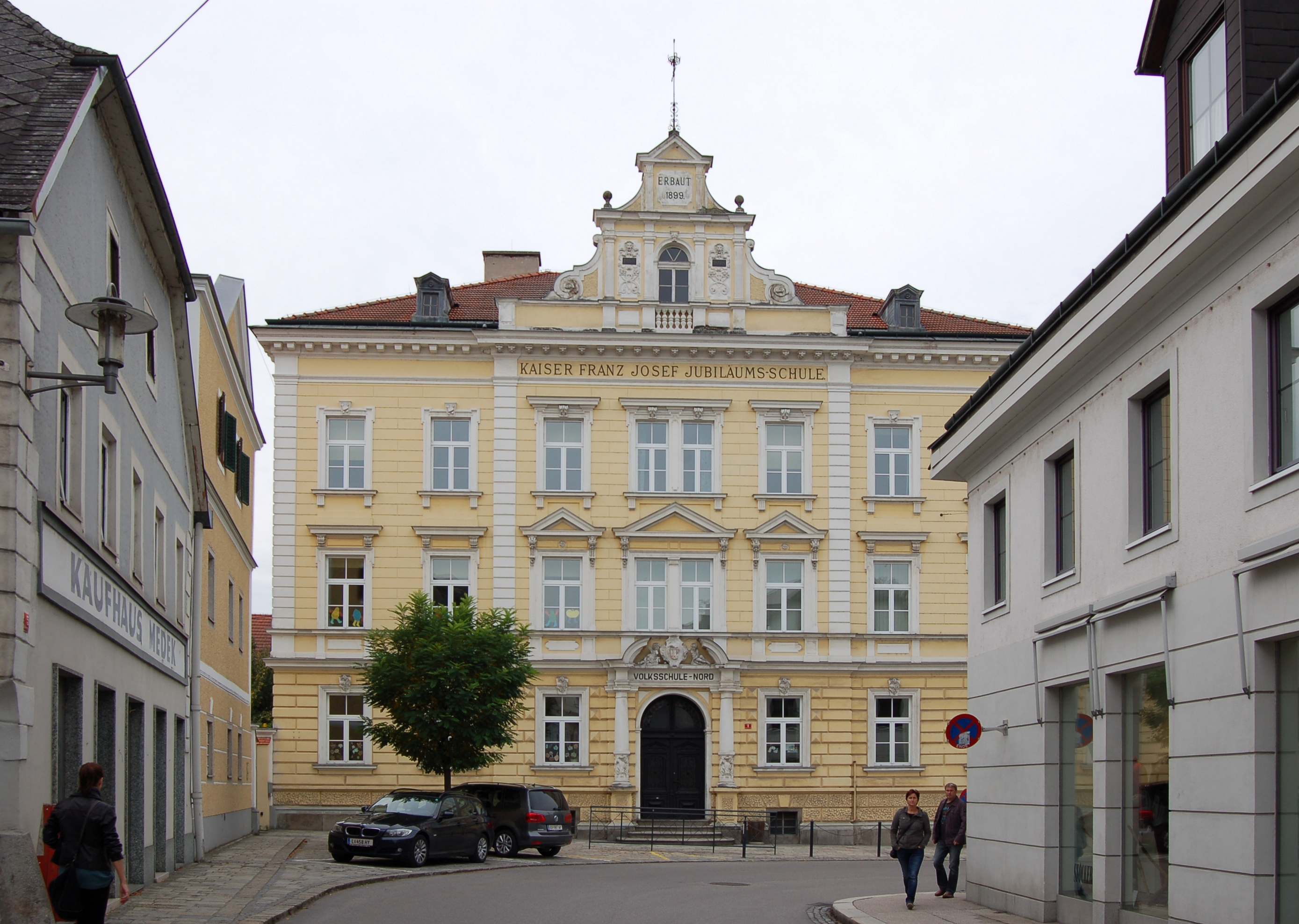 Die Kaiser Franz Josef Jubiläumsschule in der Starhembergstraße 1 in Eferding, Oberösterreich.